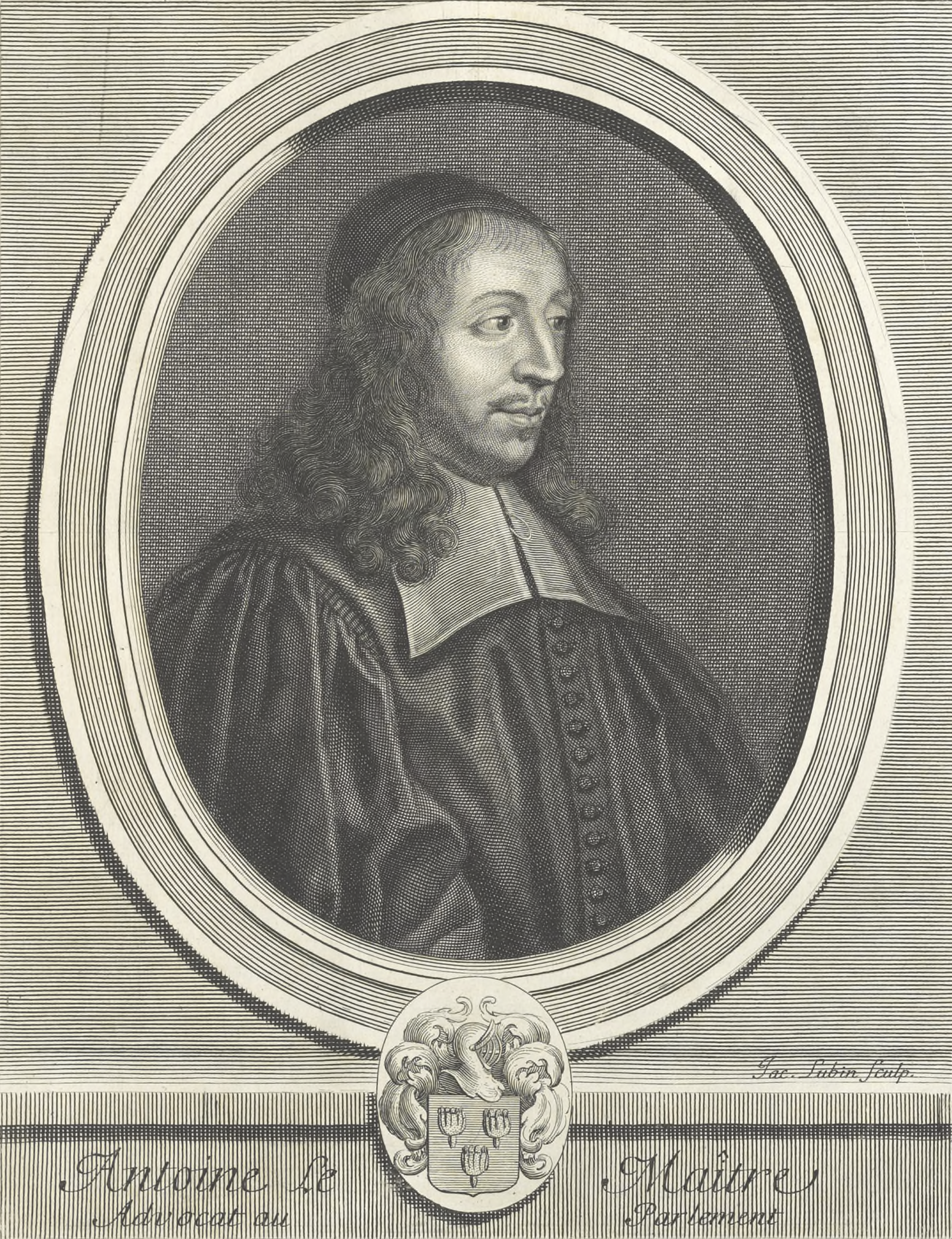 Gravure d'Antoine le Maître par Jacques Lubin.